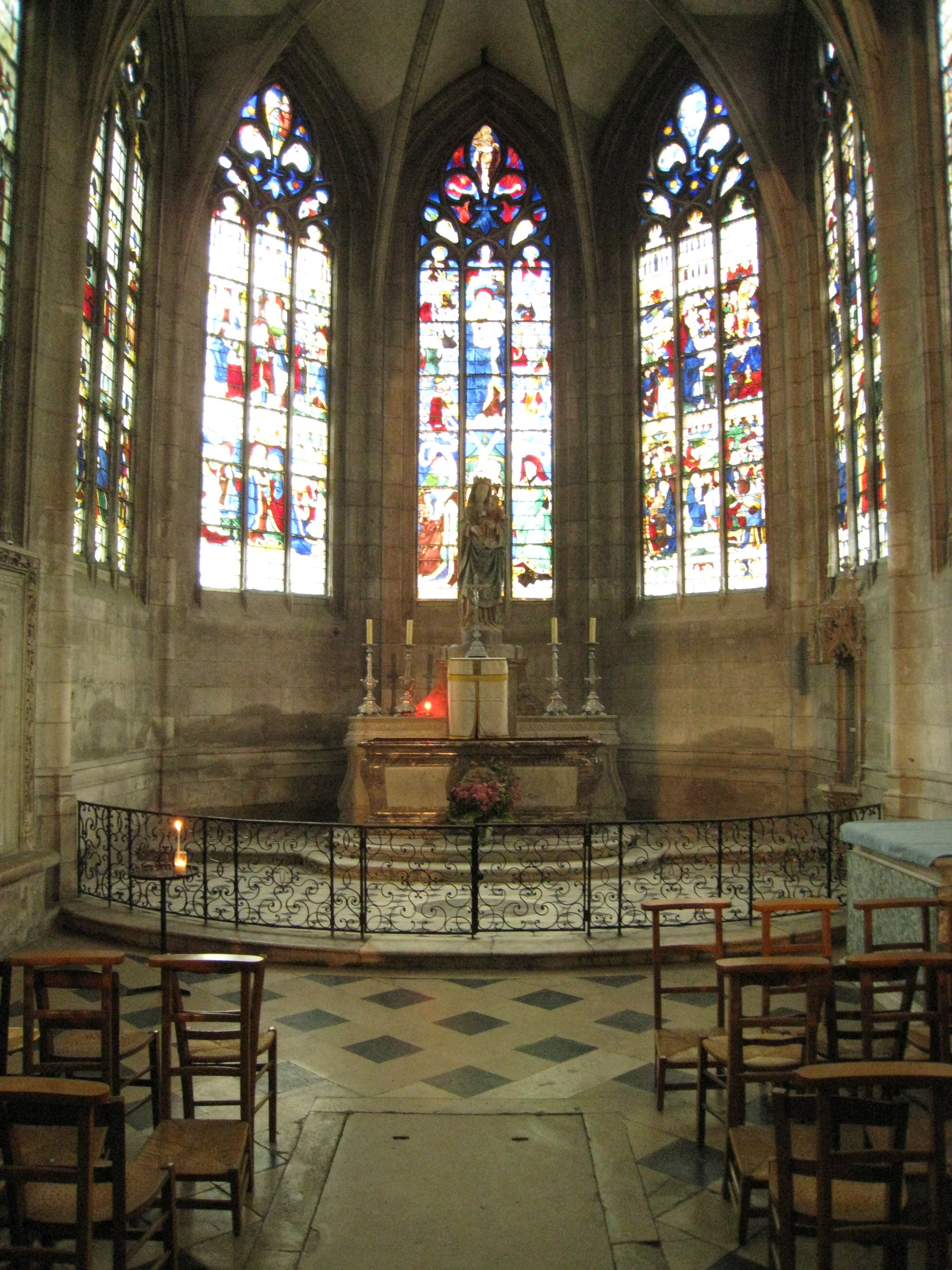 Chapelle Absidiale (dite de la Mère de Dieu) de la cathédrale Notre-Dame d'Evreux, Eure, France